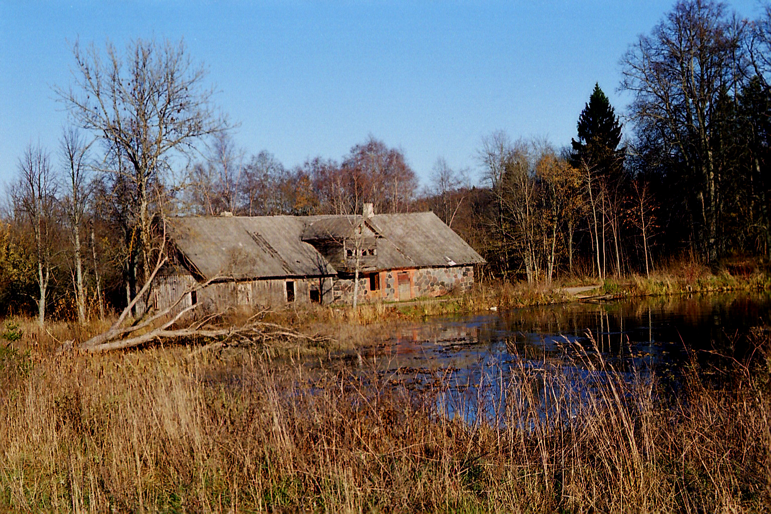 Veelikse mõisa vesiveski ja paisjärv